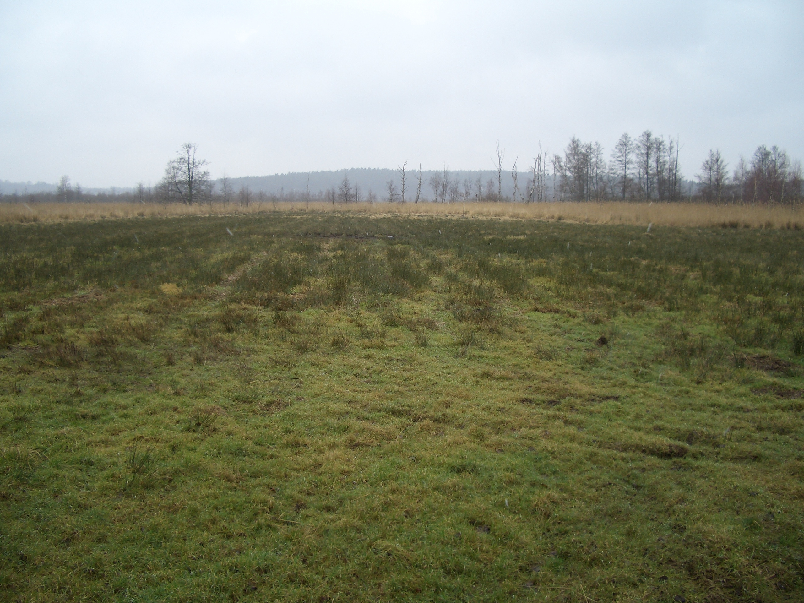 Zerninseesenke. - Google Maps - Google Earth